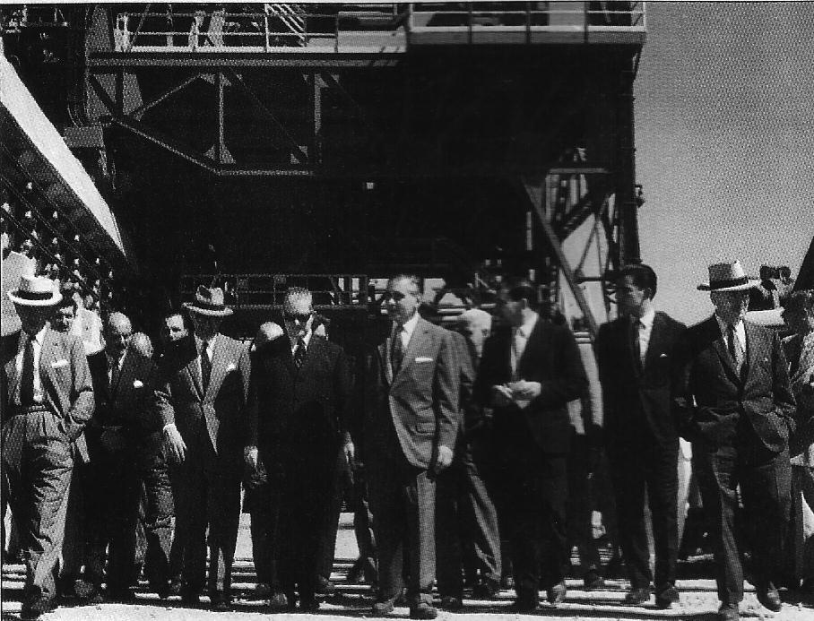 Frondizi en la planta siderurgica de San Nicolás.